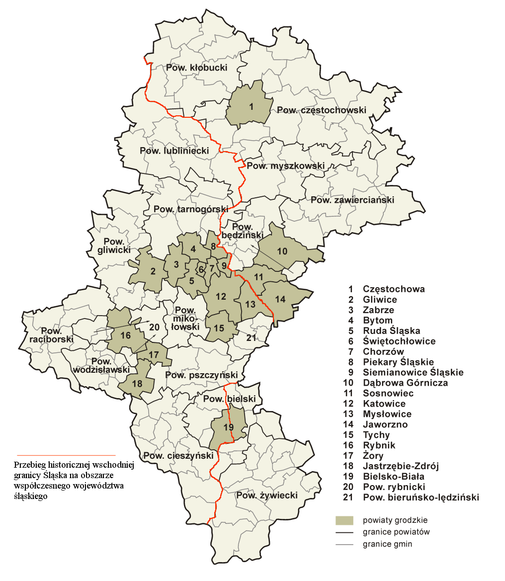 Granica między Rzecząpospolitą Obojga Narodów a Koroną Czeską na mapie obecnego województwa śląskiego, uznawana za nowożytną granicę między Śląskiem a Małopolską